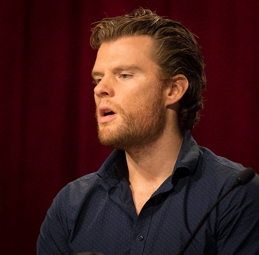 Debatt om innvandring som markerte åpningen av Forskningsdagene 2016. Arrangementet var på Edderkoppen på Scandic St. Olavs plass den 21. september 2016. Deltakere: Anne Britt Djuve (Fafo) Knut Røed (Frischsenteret) Erling Holmøy (SSB) Thomas Hegghammer (FFI) Hanne Caroline S. Iversen (JD) Svein Oppegaard (NHO) Tor-Arne Solbakken (LO) Tino Sanandaji Andreas C. Halse (Sv) Heidi Nordby Lunde (H) Sylo Taraku (Agenda) Ordstyrere: Erik Tornes Mina Hauge Nærland